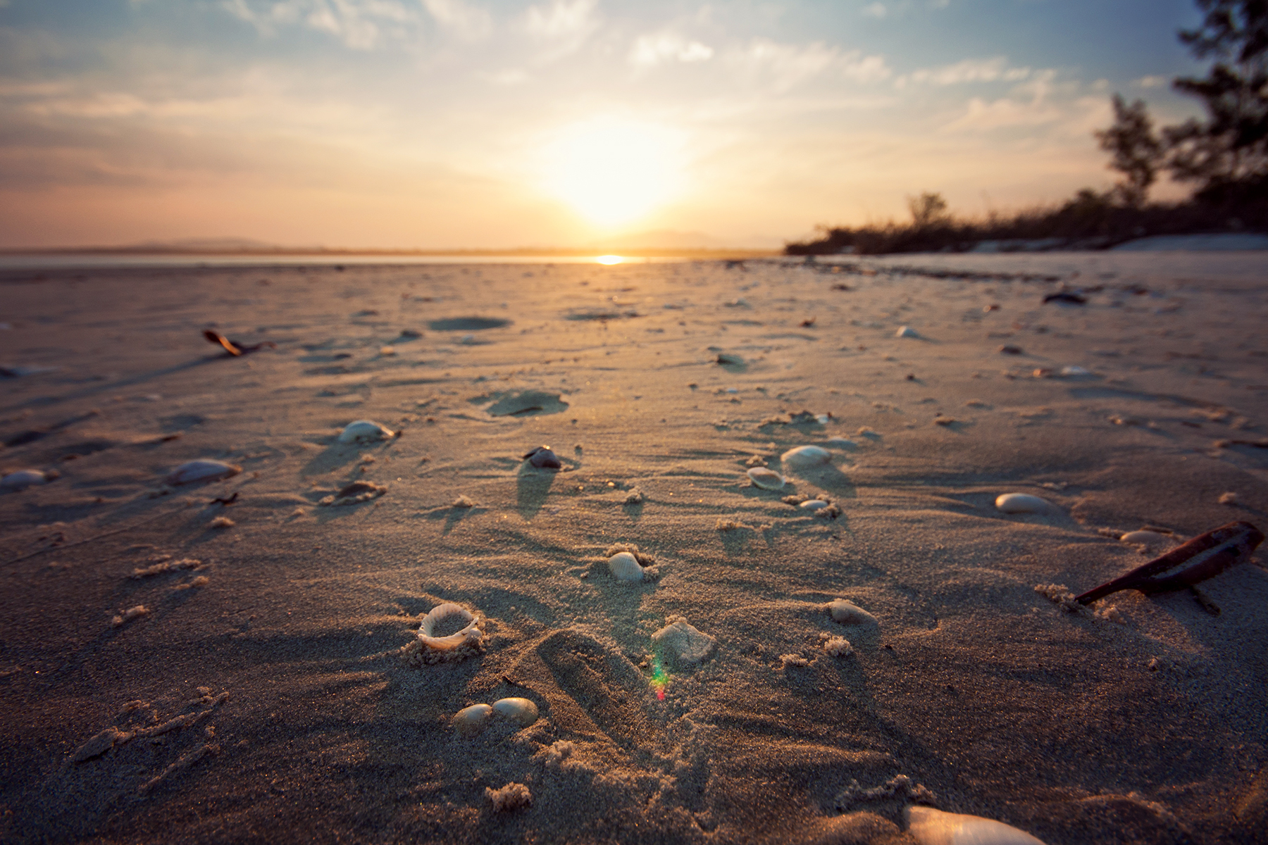 Conchas na praia ao sul da ilha